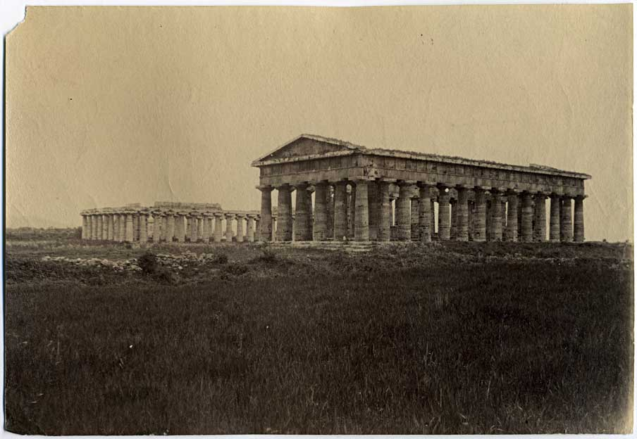 I templi greci di Paestum, nel 1890-1900 circa. Numero di catalogo della foto: 951.